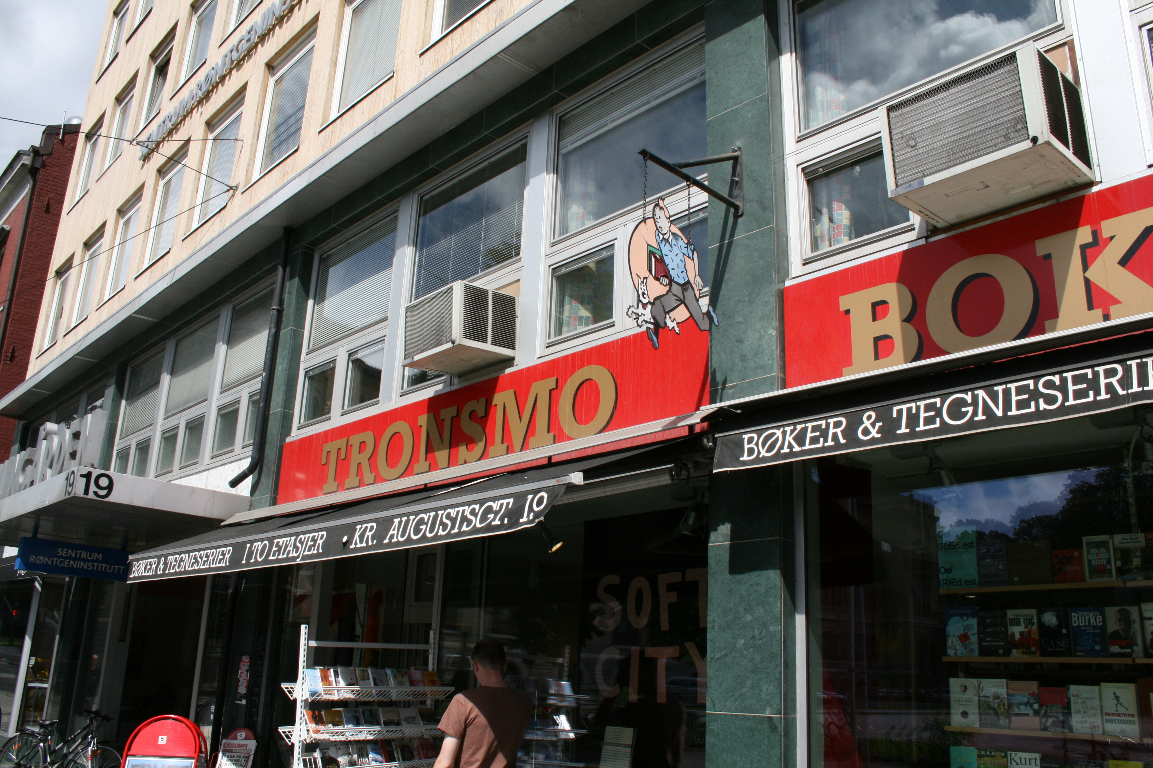 Bokhandelen Tronsmo i Kristian Augusts gate 19 i Oslo.